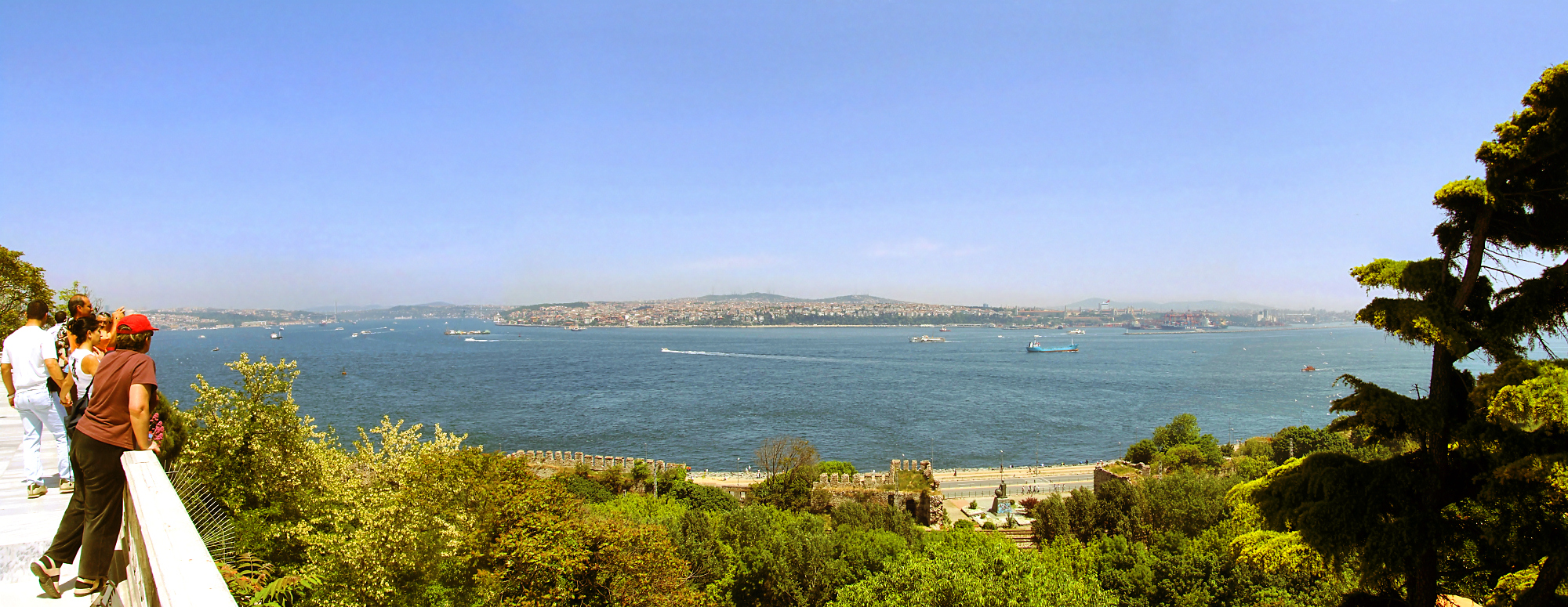 Stambuł, Bosfor (z pałacu Topkapi); Istambul, Bosphorus (from Topkapi palace)